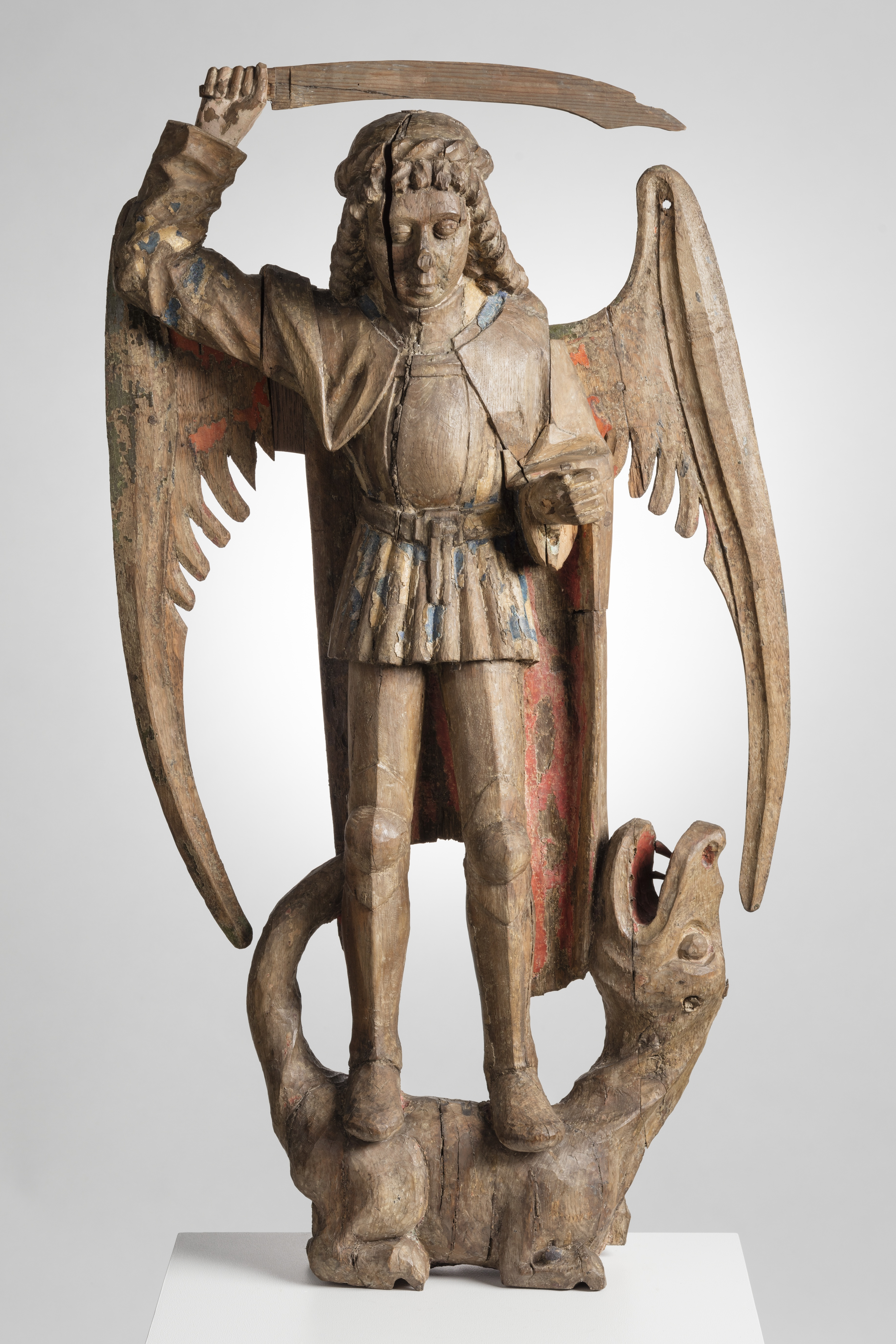 1500-luvun alkupuolella valmistettu arkkienkeli Mikaelia esittävä puuveistos Someron kirkosta. Veistos kuuluu Suomen Kansallismuseon kokoelmaan.